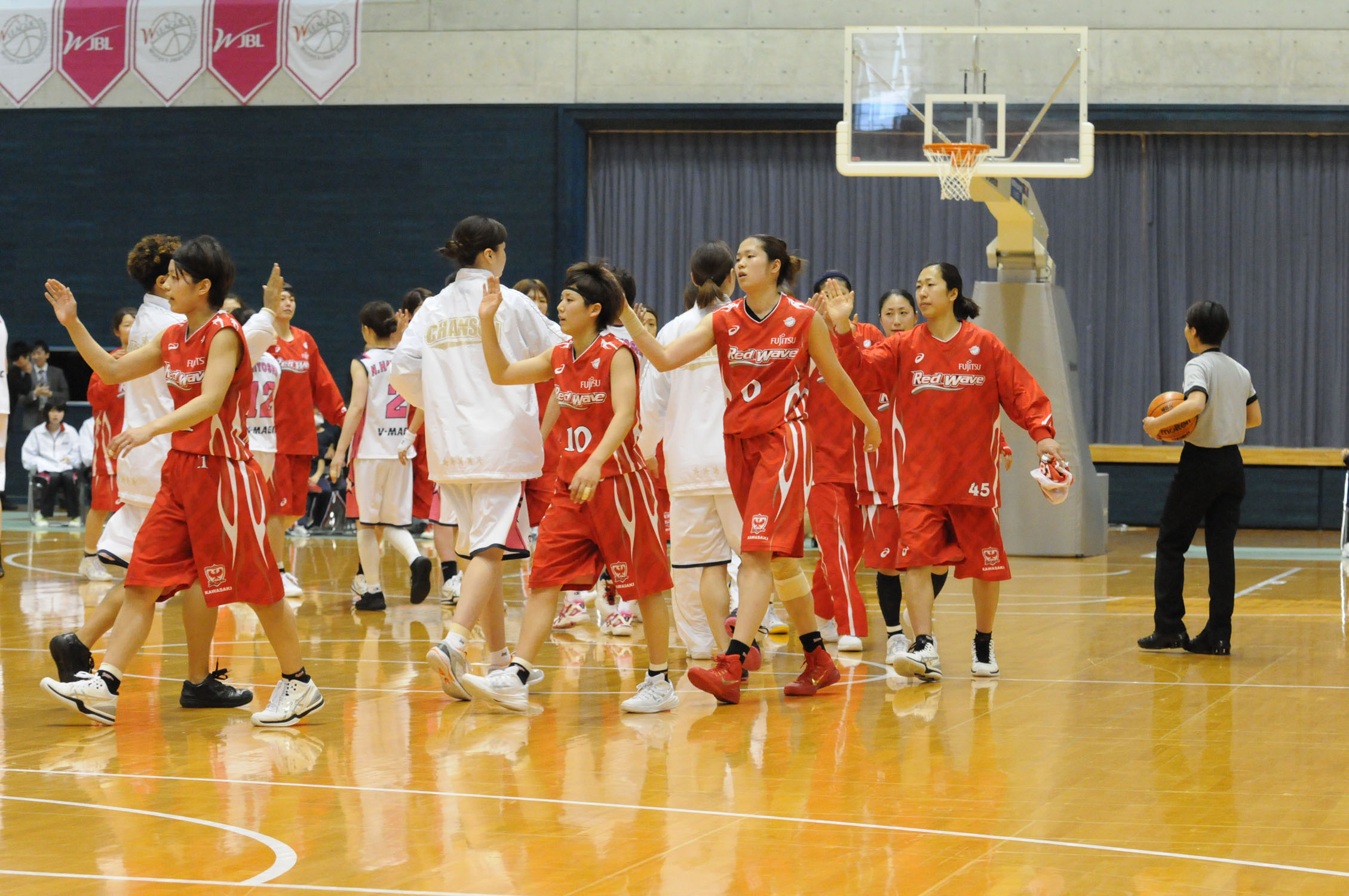 WJBL 14-15レギュラーリーグ、富士通対シャンソン。美郷体育館リリオス。